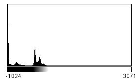 HISTO ORGIN